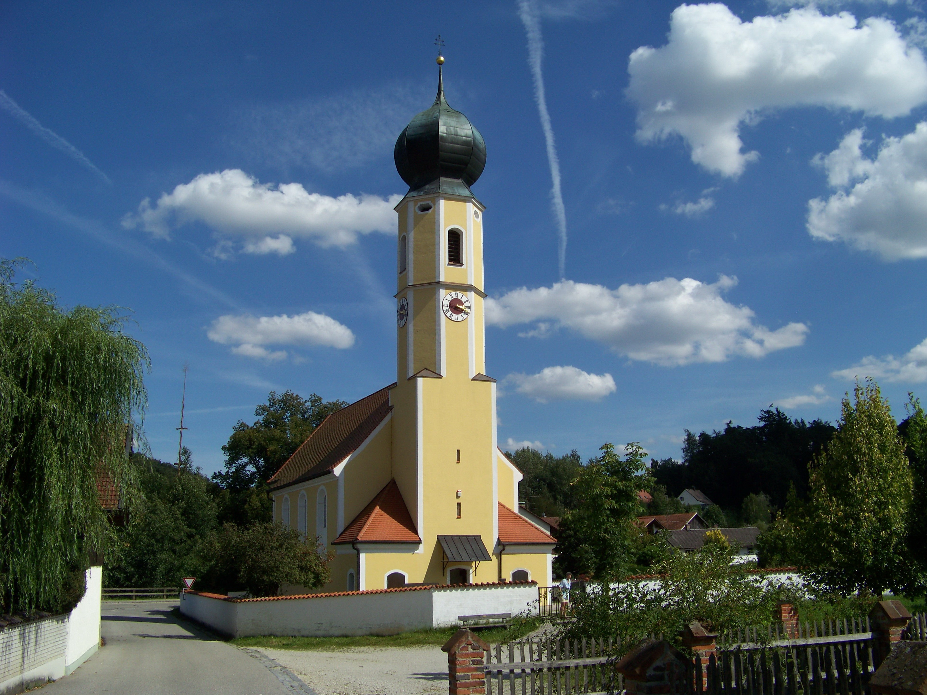 Oberaichbach Kirchstraße 1. Kirche St. Peter u. Paul, barock, 1736-42; mit Ausstattung.